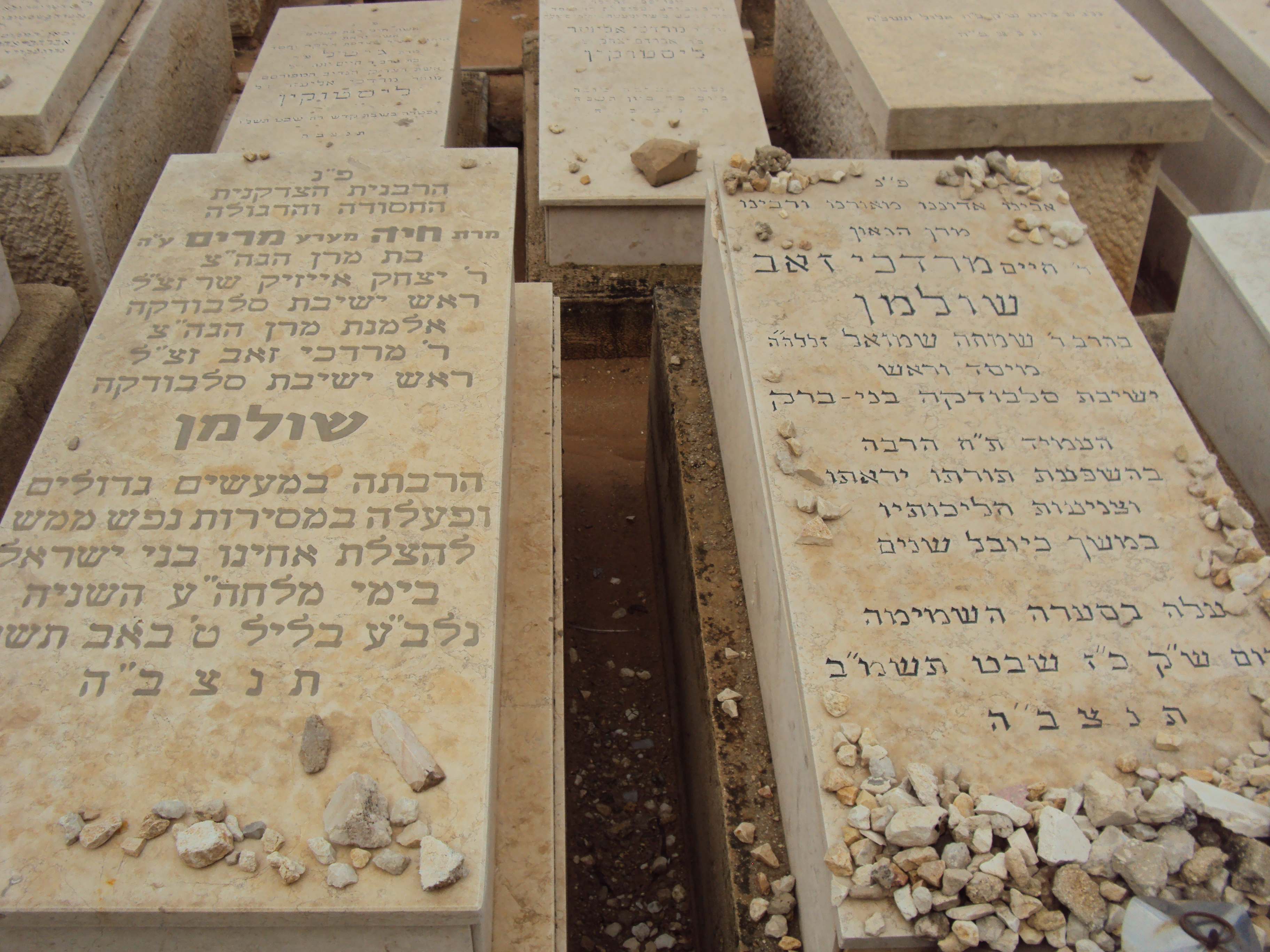 בית הקברות שומרי שבת, זכרון מאיר, בני ברק